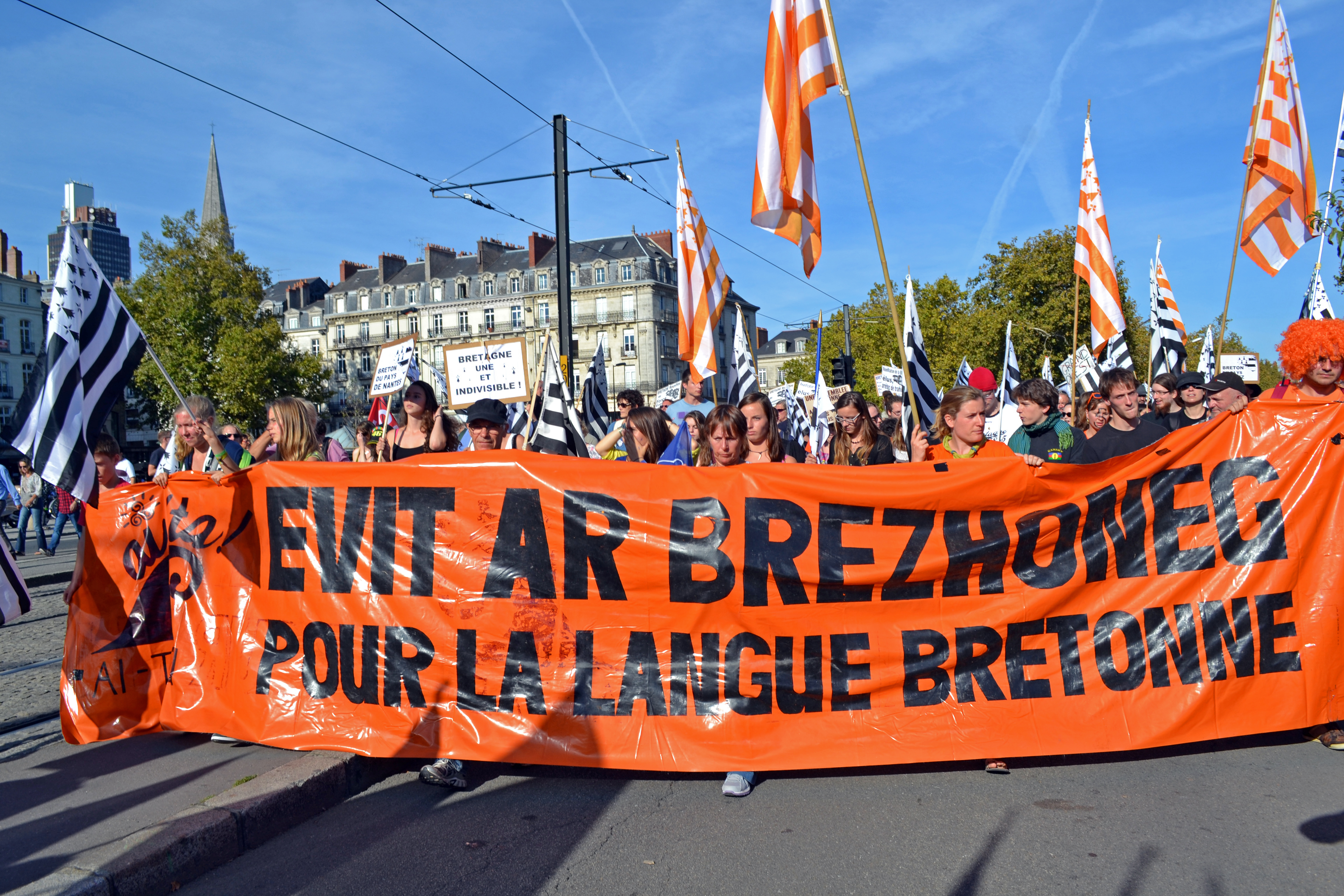 Des milliers de drapeaux bretons brandis à Nantes le 27 septembre 2014 pour célébrer la Bretagne entière et son projet d'avenir commun. La 3e grande manifestation populaire de l'année revendiquait une cohérence territoriale, économique, culturelle, pour que la péninsule plus que millénaire conserve son unité. - Cortège du collectif Ai'ta !